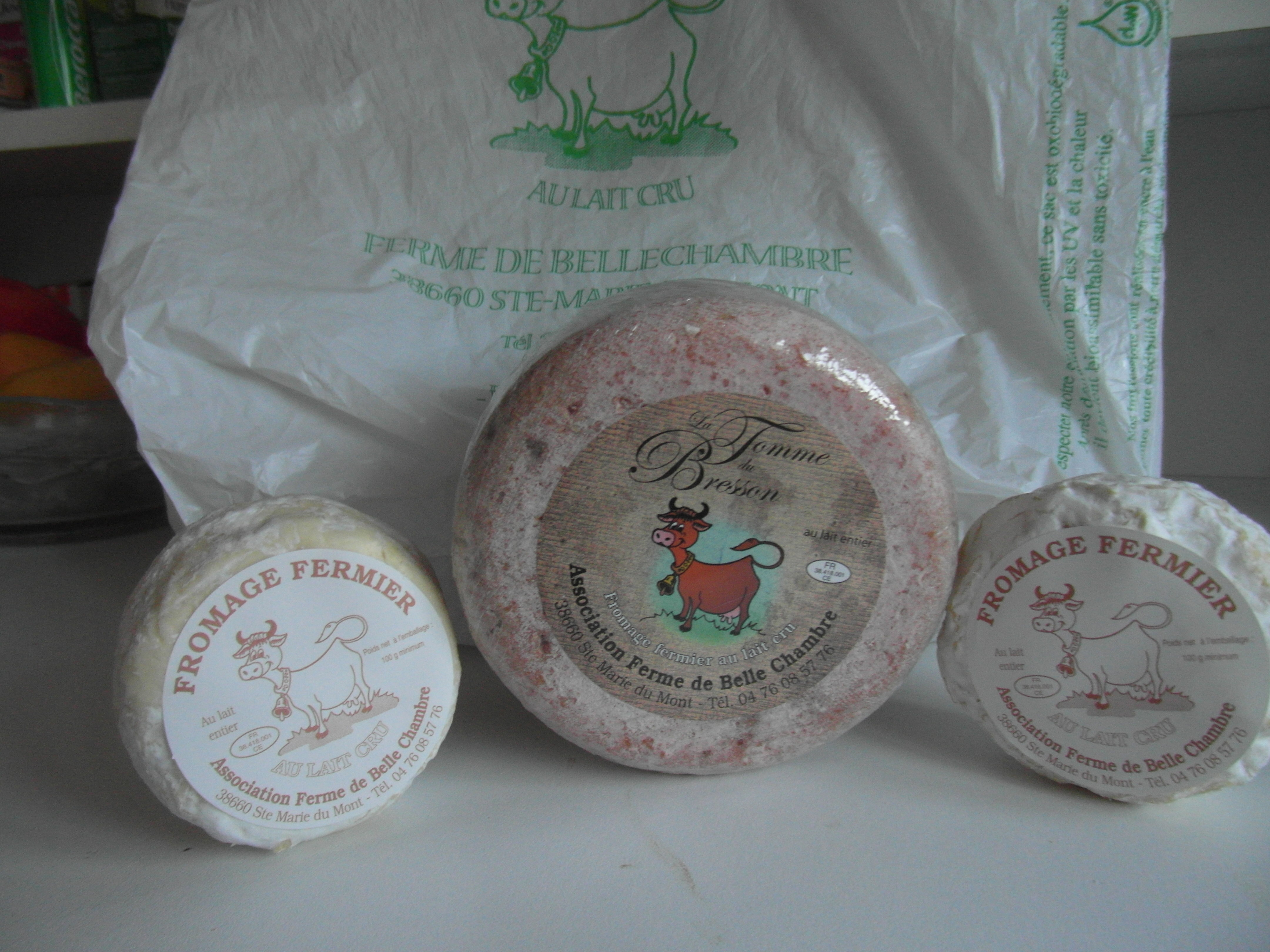 Fromage de Chartreuse, Ferme de Bellechambre